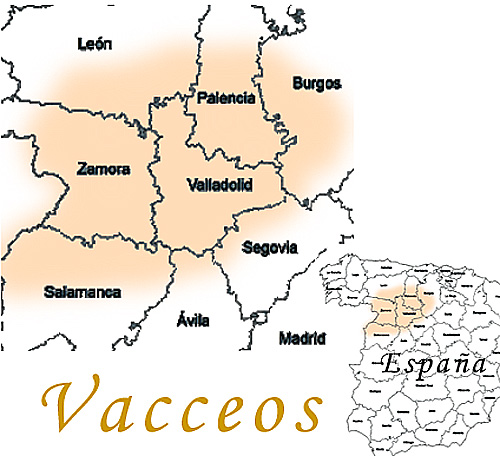 Mapa sobre la posible situación de los pueblos pre-románicos en la península Iberica autor user:papix